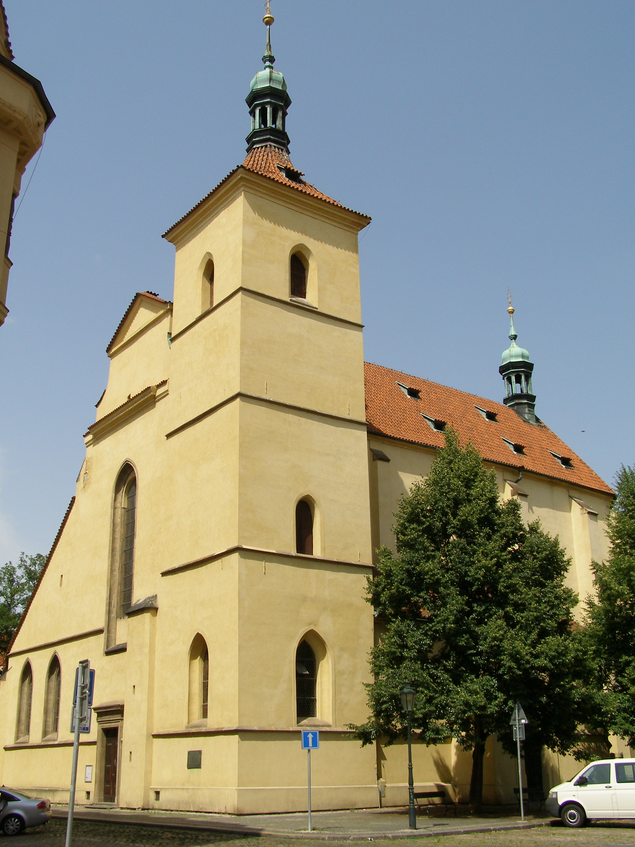 Kostel sv. Haštala (Staré Město), Praha 1, Haštalské nám., Staré Město